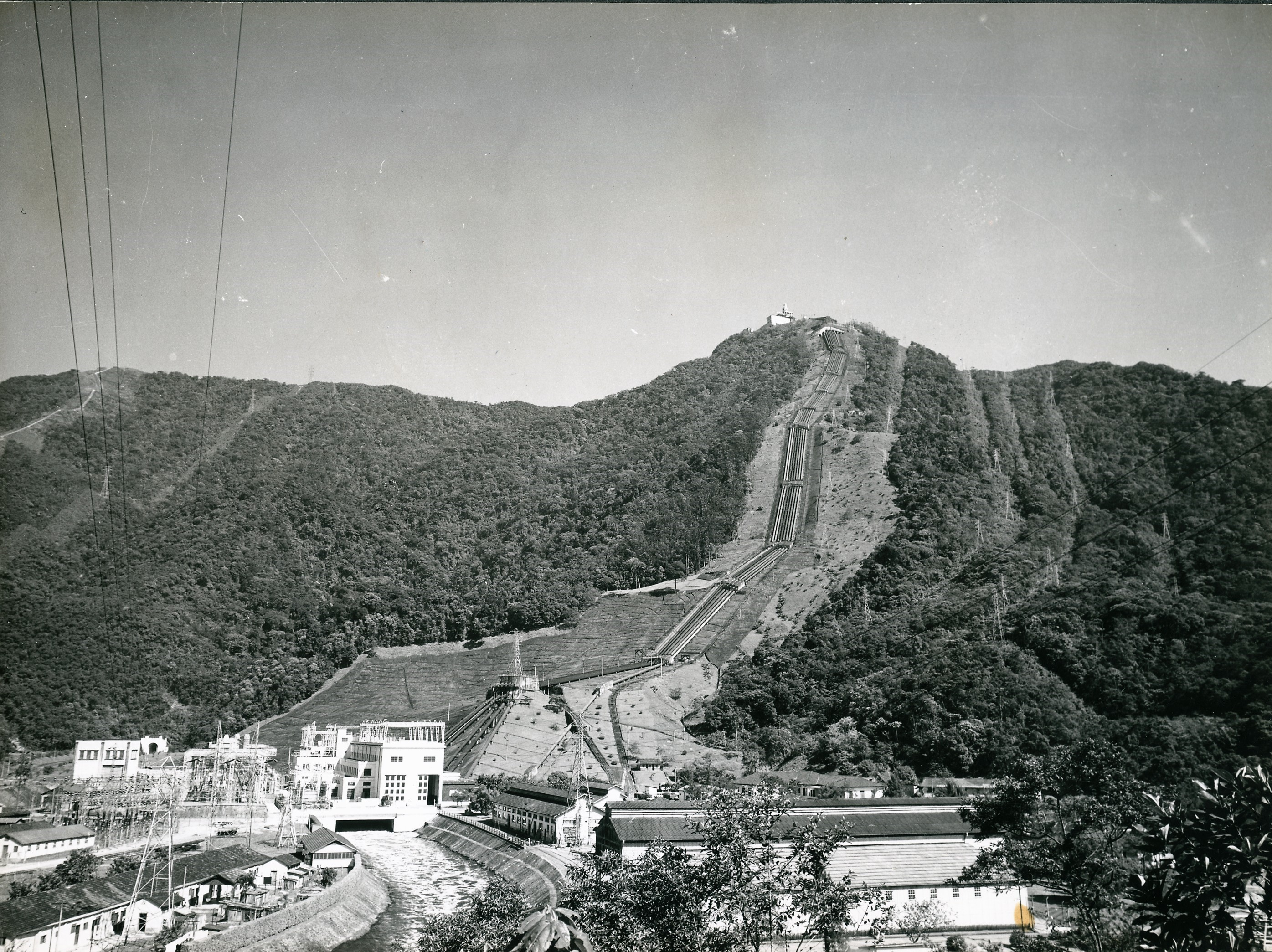 Fotografia do Fundo Correio da Manhã, sob a guarda do Arquivo Nacional.